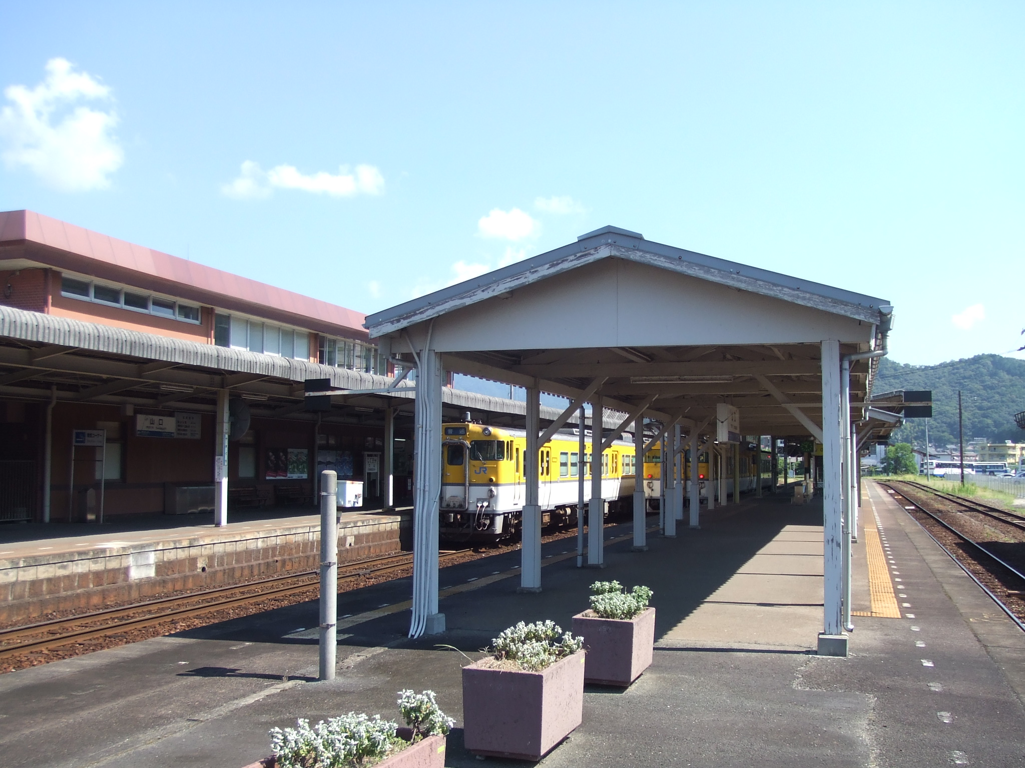 山口駅 駅構内の様子